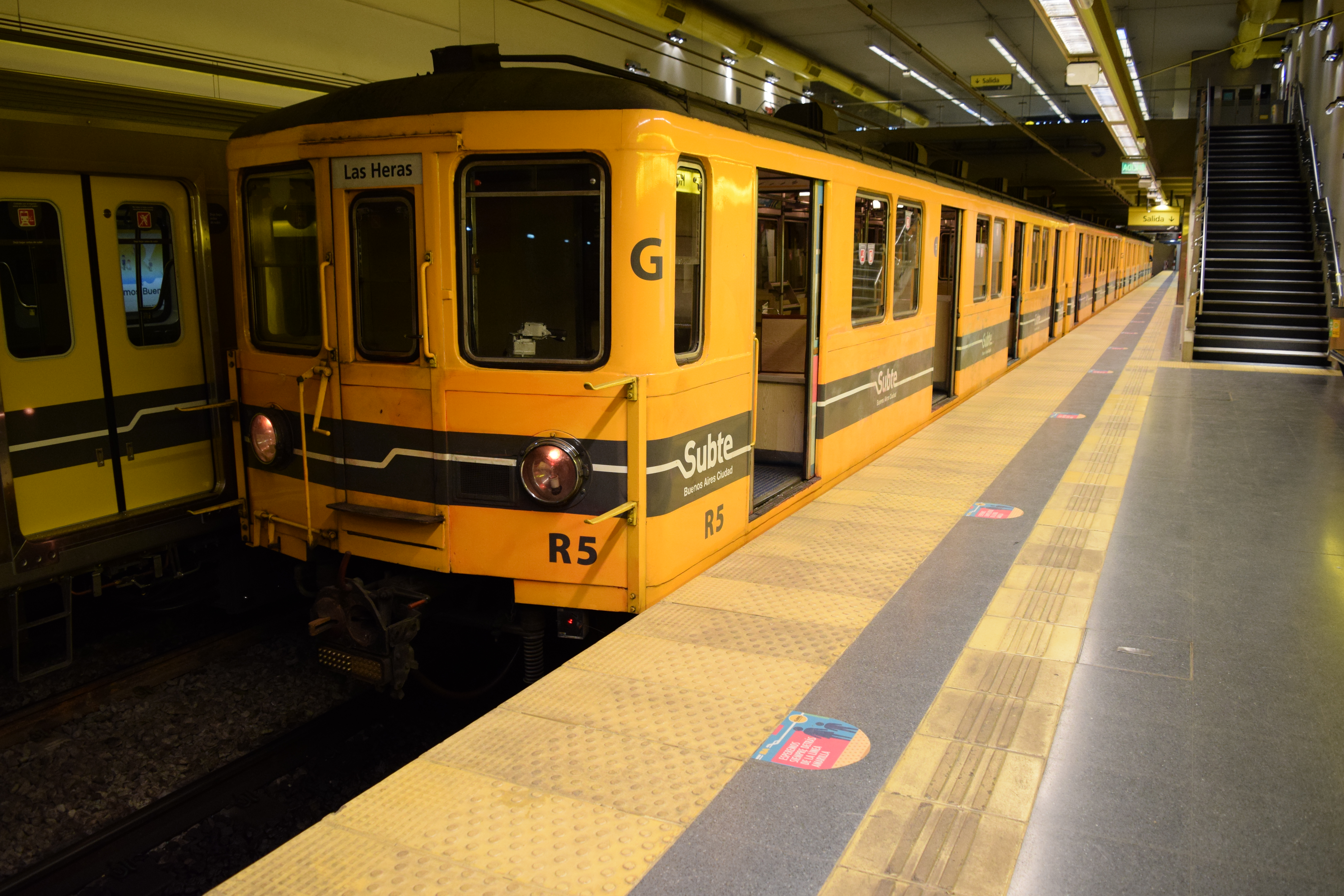 Formación Siemens en la Est. Las Heras.